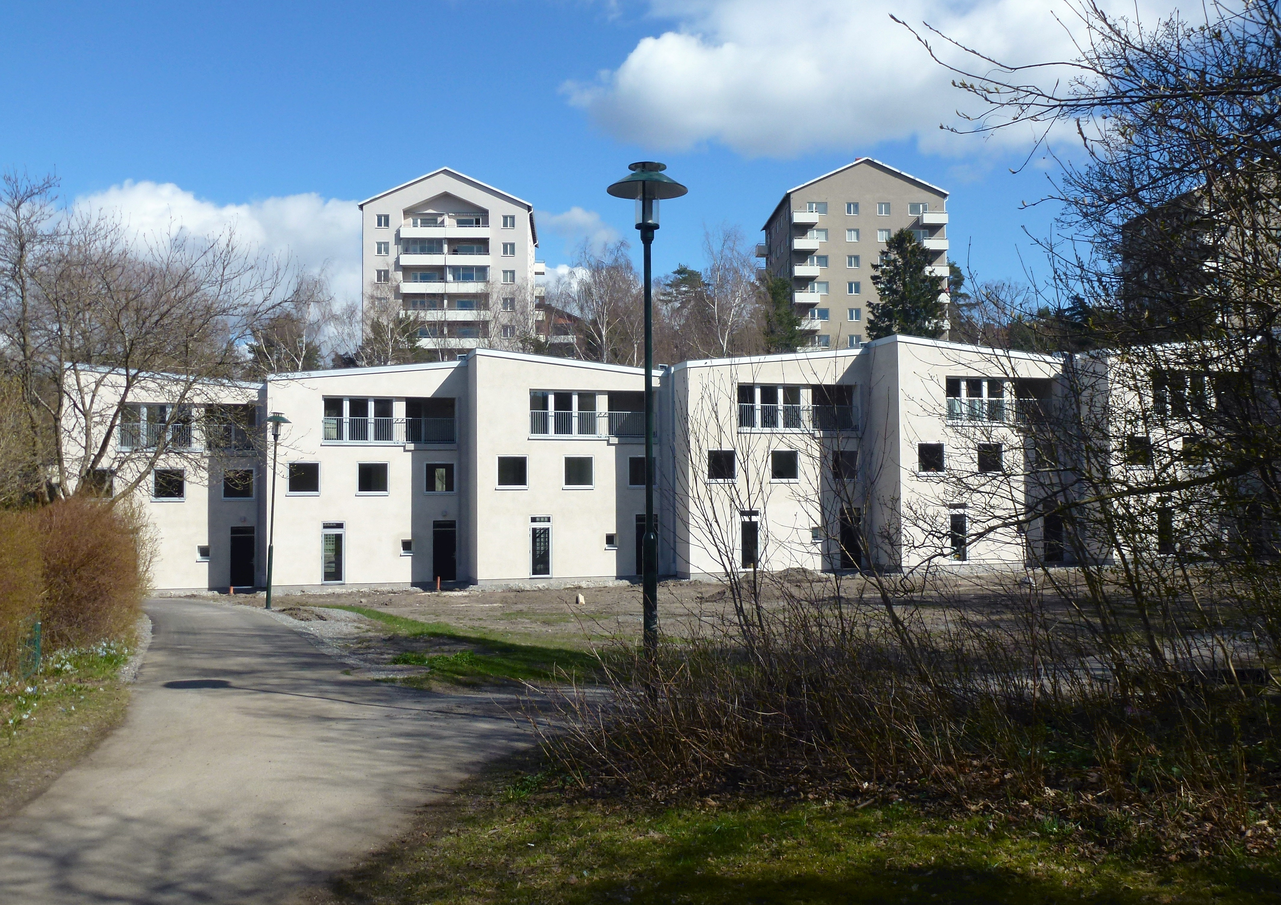 Kvarteret Nordanvinden, Björkhagen